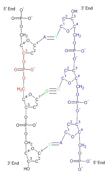 DNA Biochemical structure